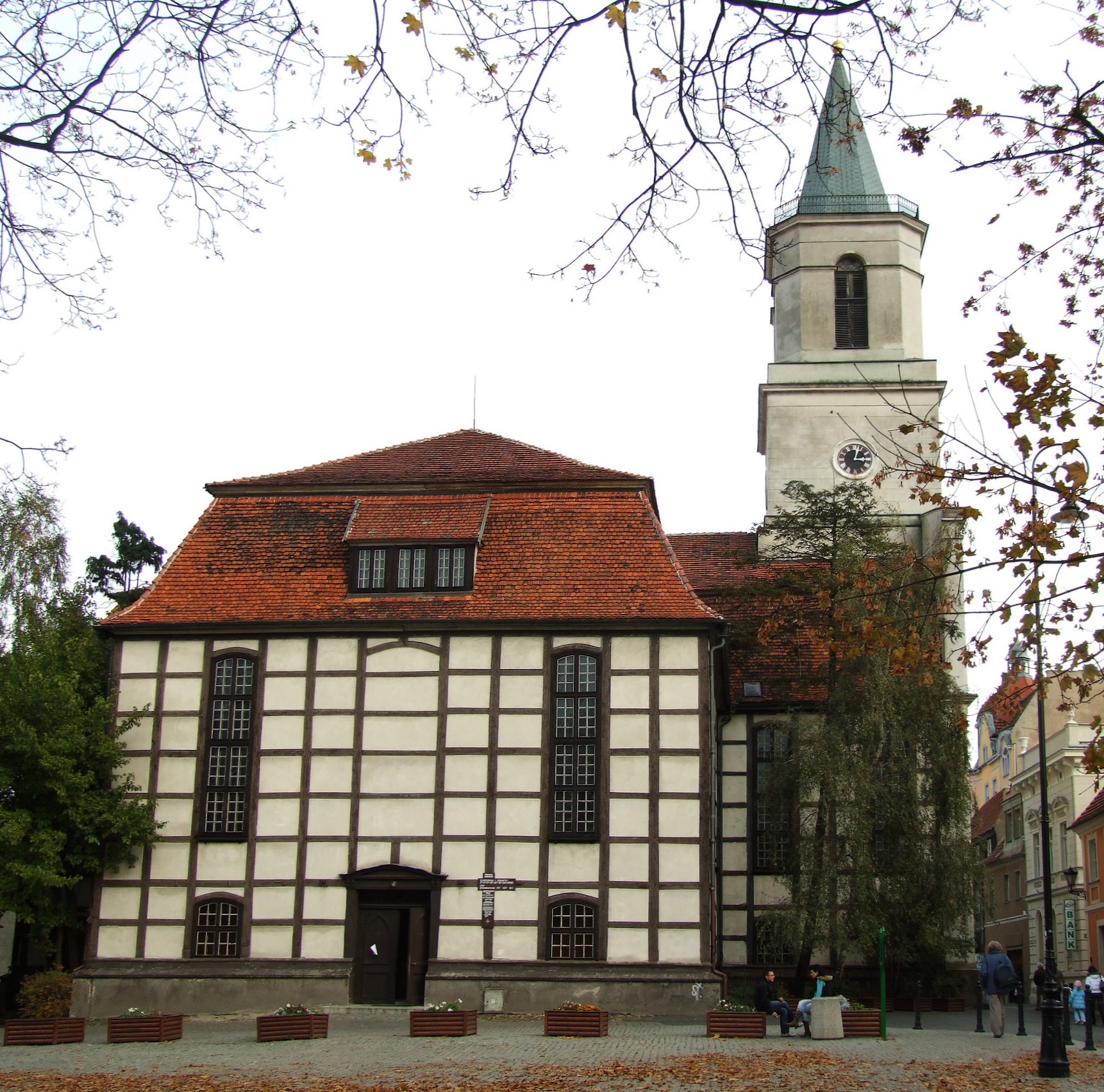 Kościół Matki Boskiej Częstochowskiej w Zielonej Górze Our Lady of Czestochowa Church in Zielona Góra Author: Mohylek 13:54, 2 November 2006 (UTC)